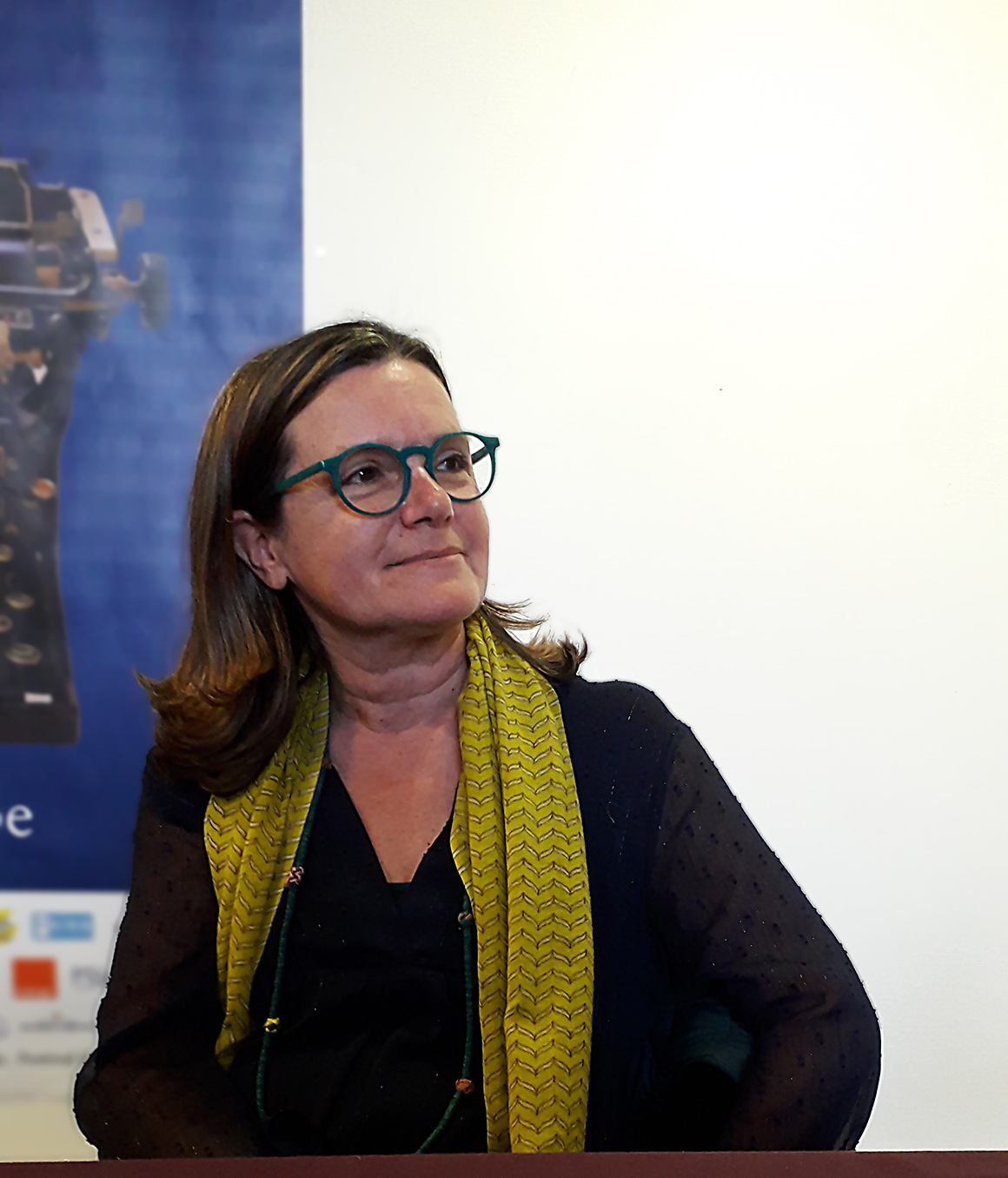 Sylvie Yvert am 5. bis 16. Mai 2019 beim "Quartier du Livre à la mairie"